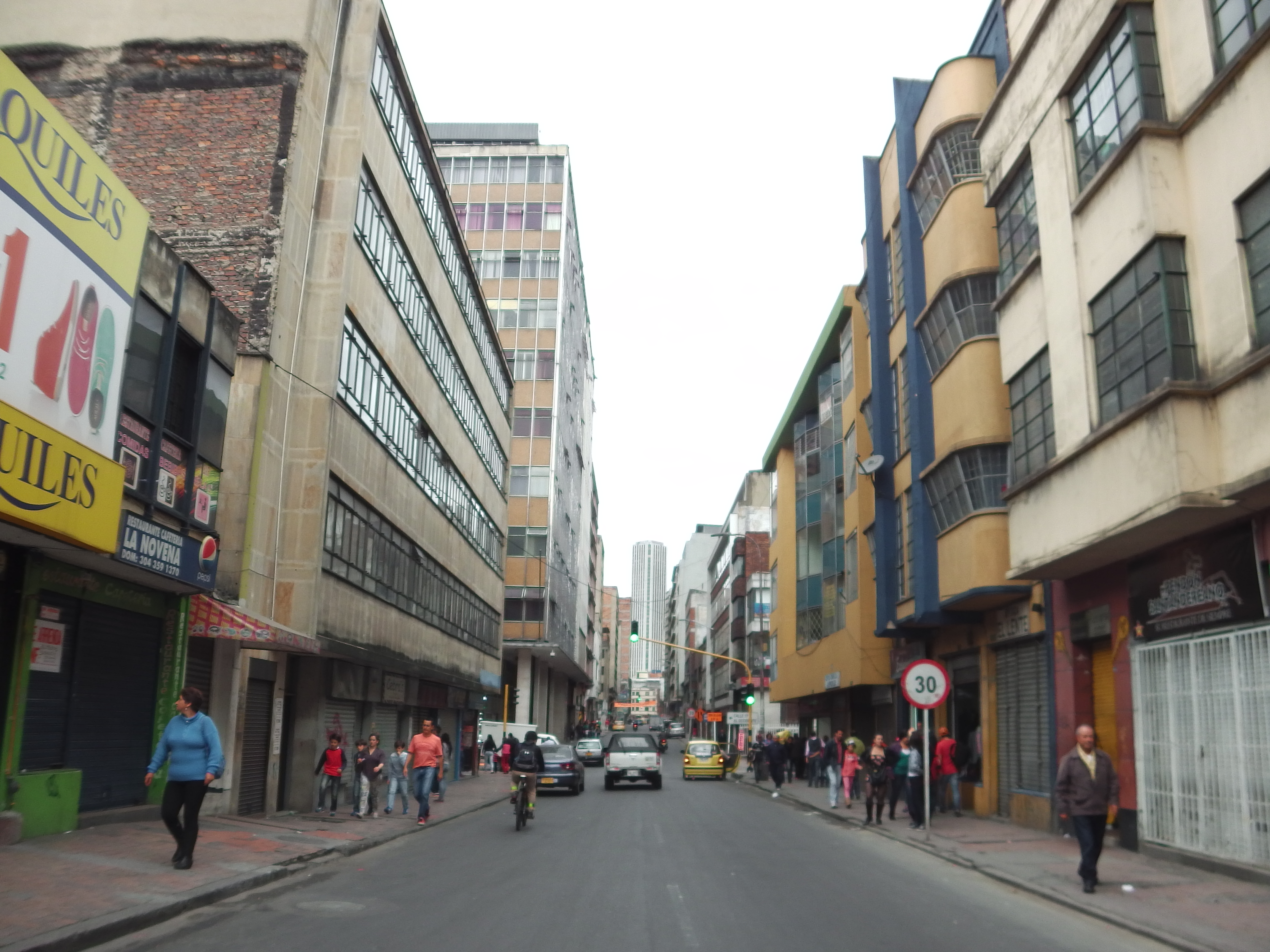 Carrera novena entre calles 15 y 16 en el Barrio Veracruz de Bogota, Colombia.